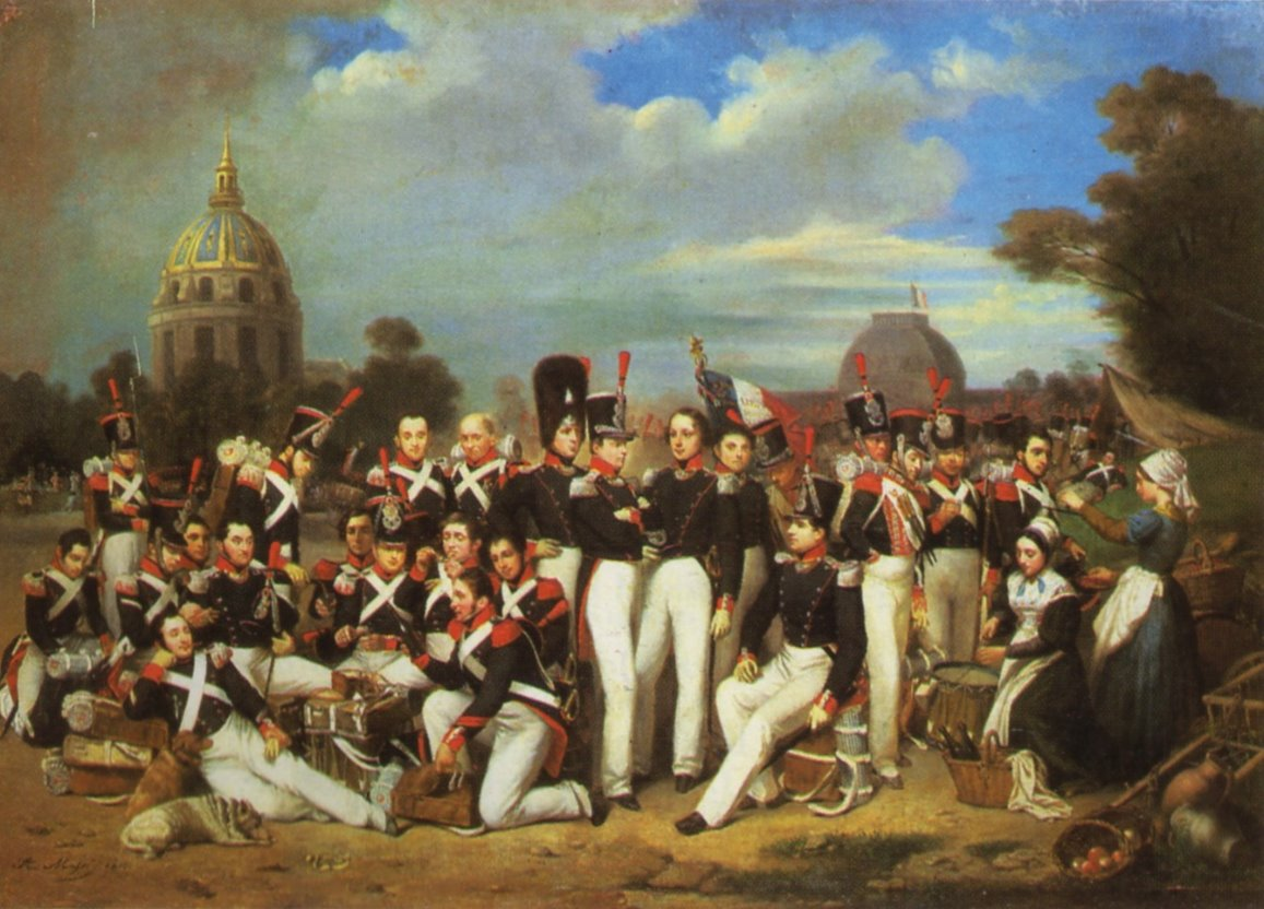 Une compagnie de la 2e legion sur les champs de mars à Paris en 1836 par Auguste Antoine Masse